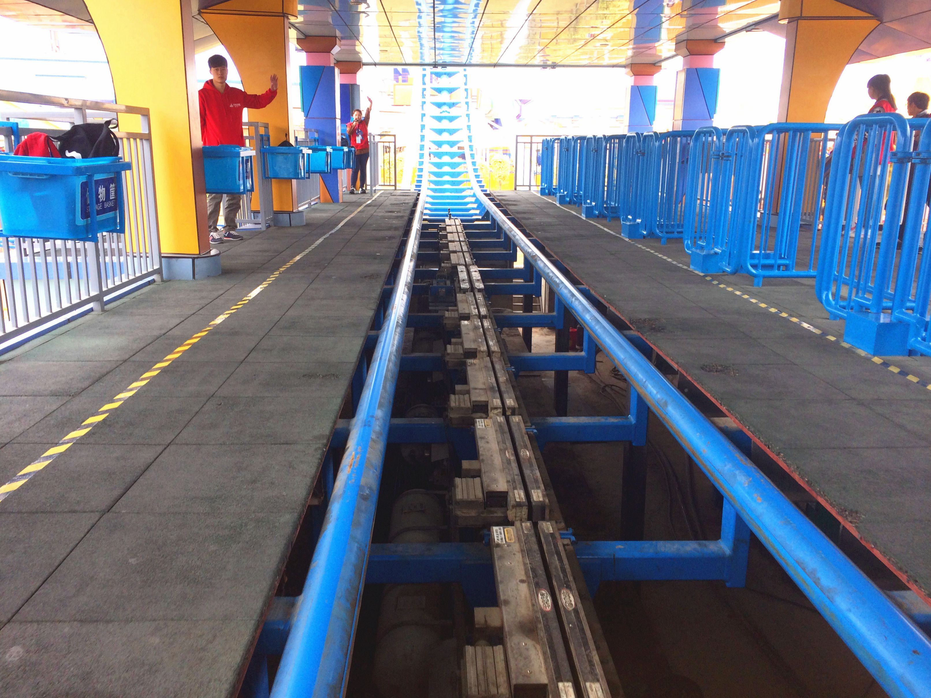 厦门方特极地快车过山车站台